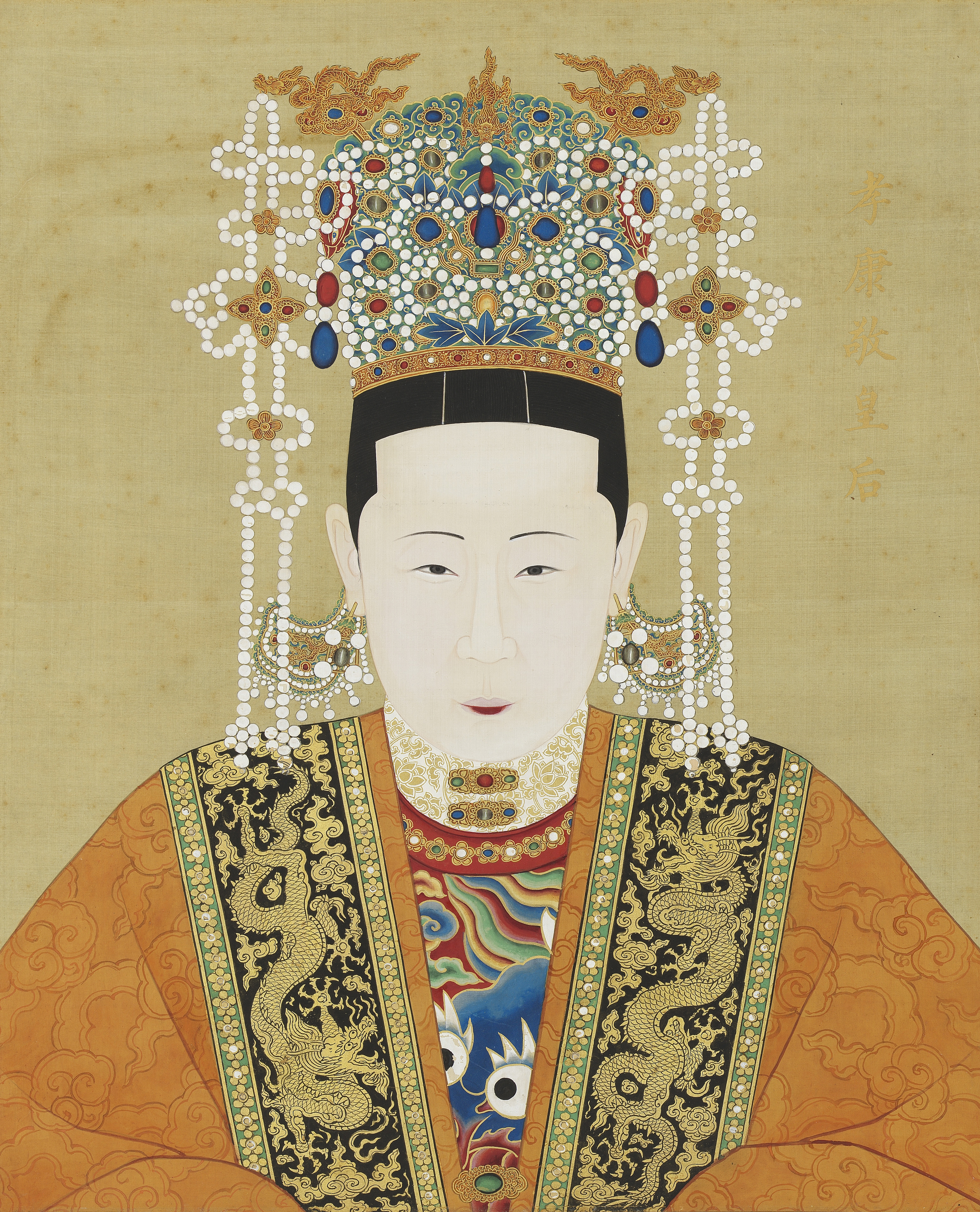 中文（中国大陆）: 作者已经去世超过200年，作品已经进入公有领域。